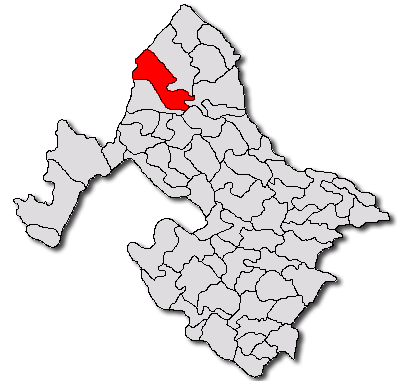 Categorie:Hărţi ale judeţului Mehedinţi